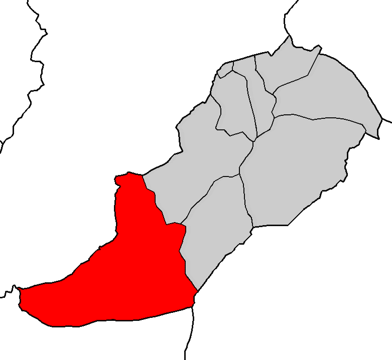 Situación da parroquia do Pereiro no concello de Alfoz